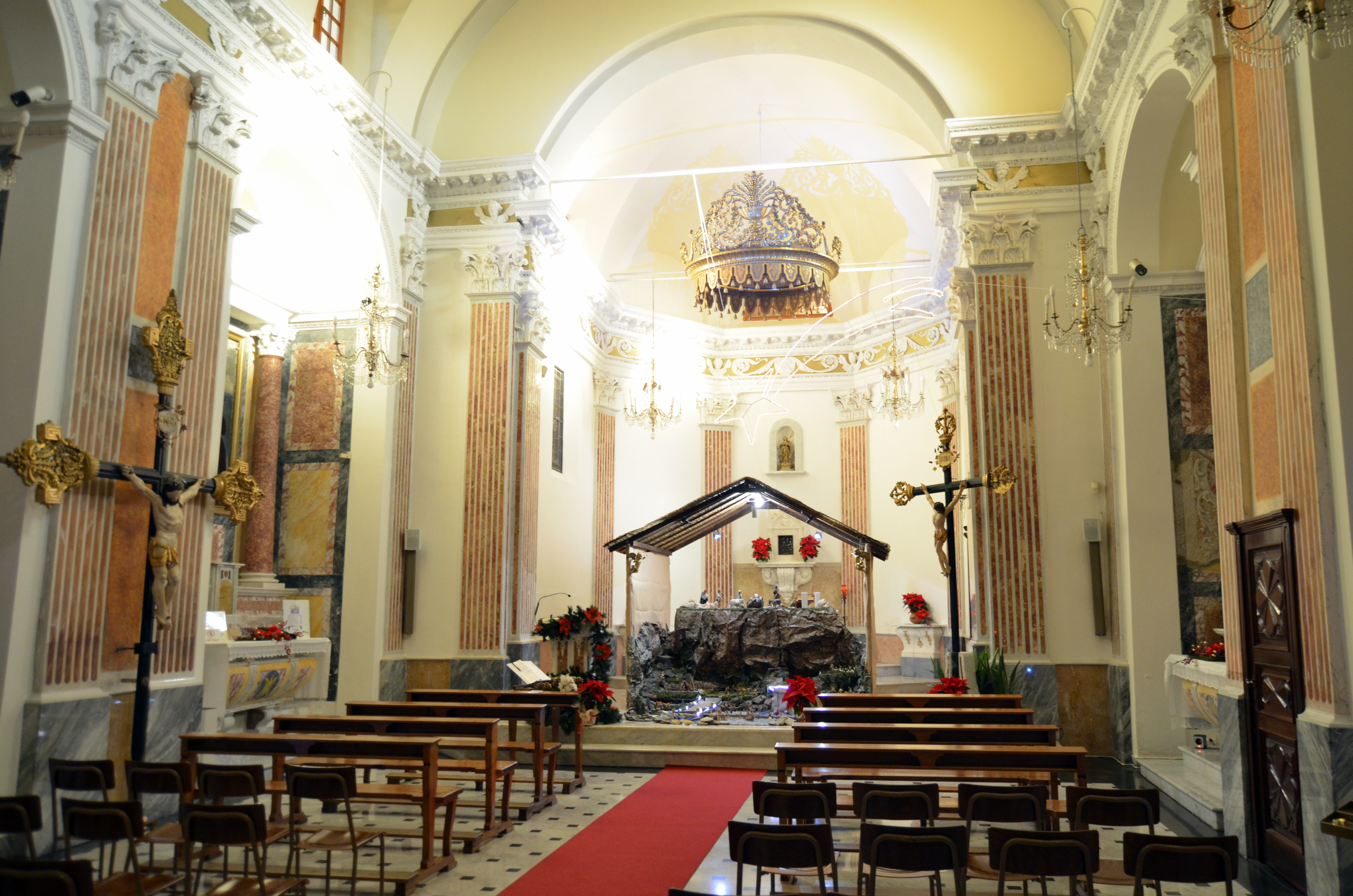 Navata interna della chiesa di San Maurizio, San Maurizio di Monti, Rapallo, Liguria, Italia